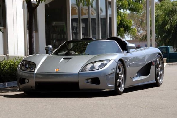 Koenigsegg CCX Yo mismo tomé la fotografía (esto es dudoso...)